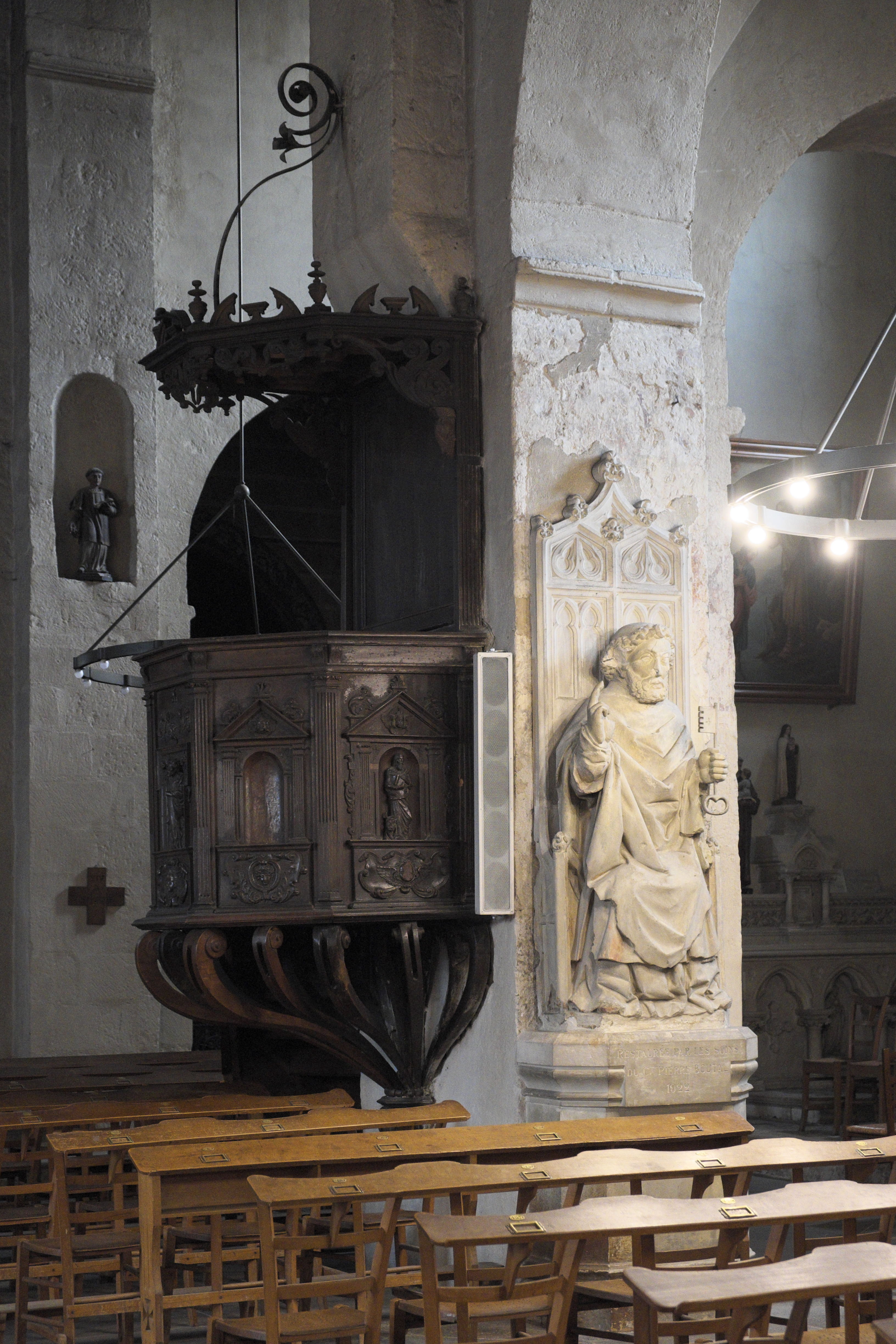 Katholische Kirche Saint-Pierre in Yzeure im Département Allier (Auvergne-Rhône-Alpes/Frankreich), Kanzel von 1623 und Apostel Petrus